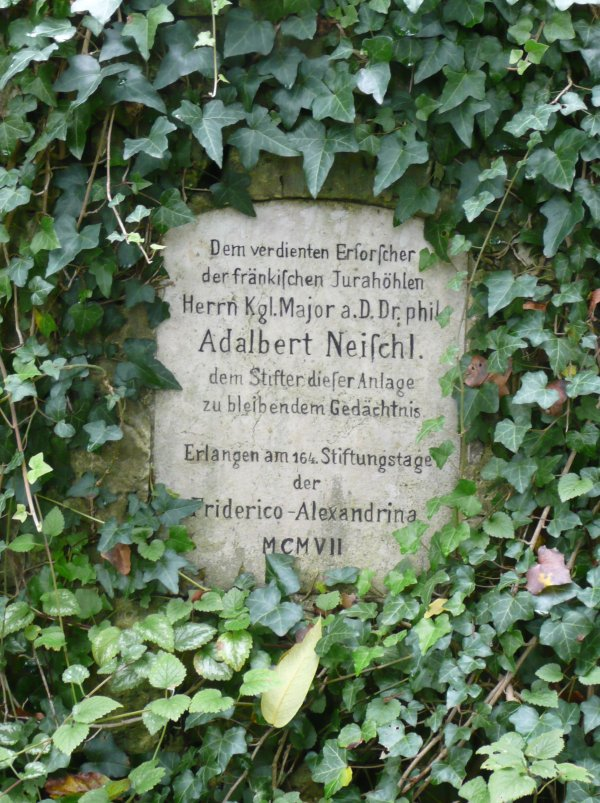 Botanischer Garten Erlangen, 2008